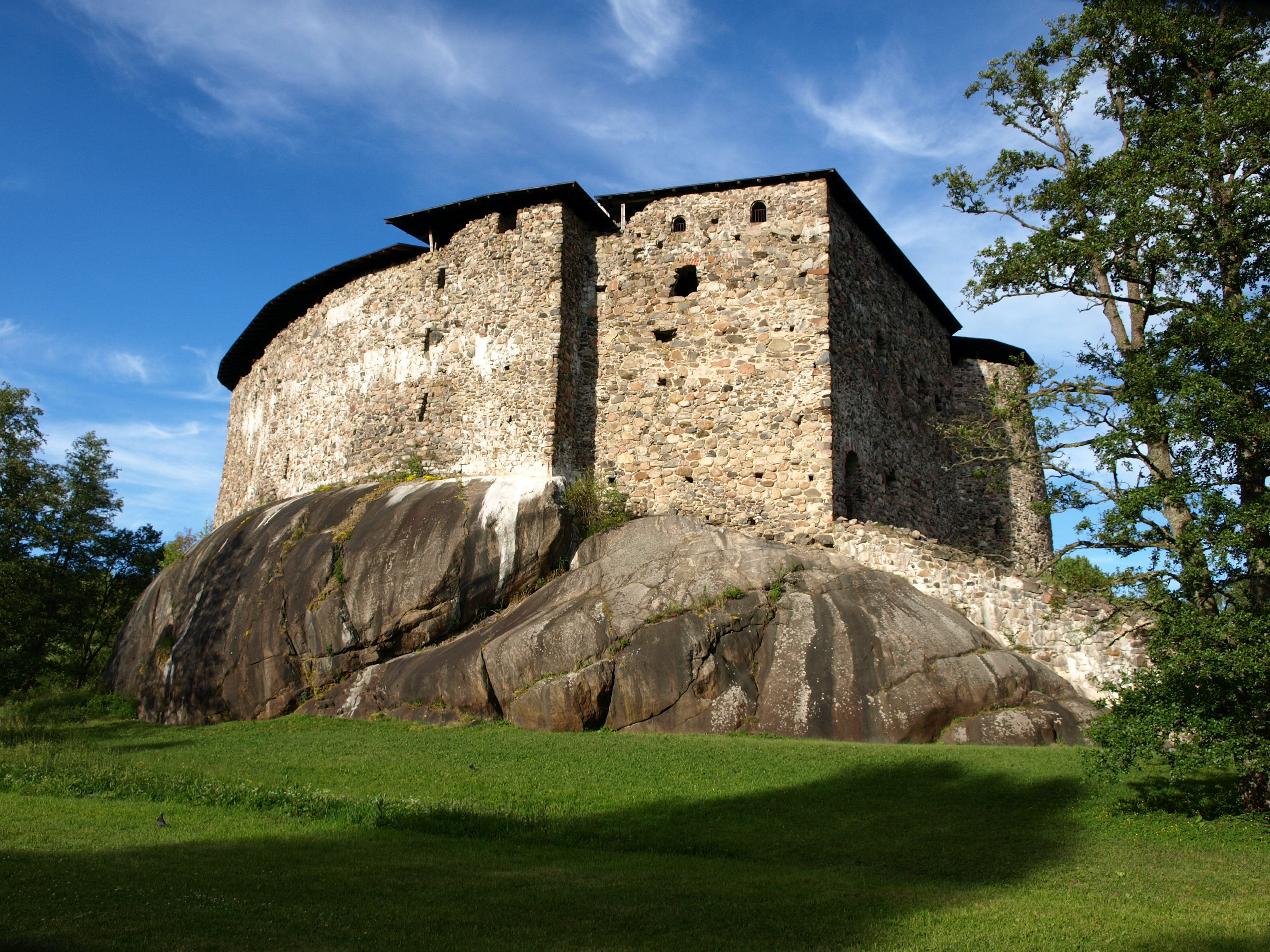 Die Burgruine Raseborg bei Snappertuna (Südfinnland)